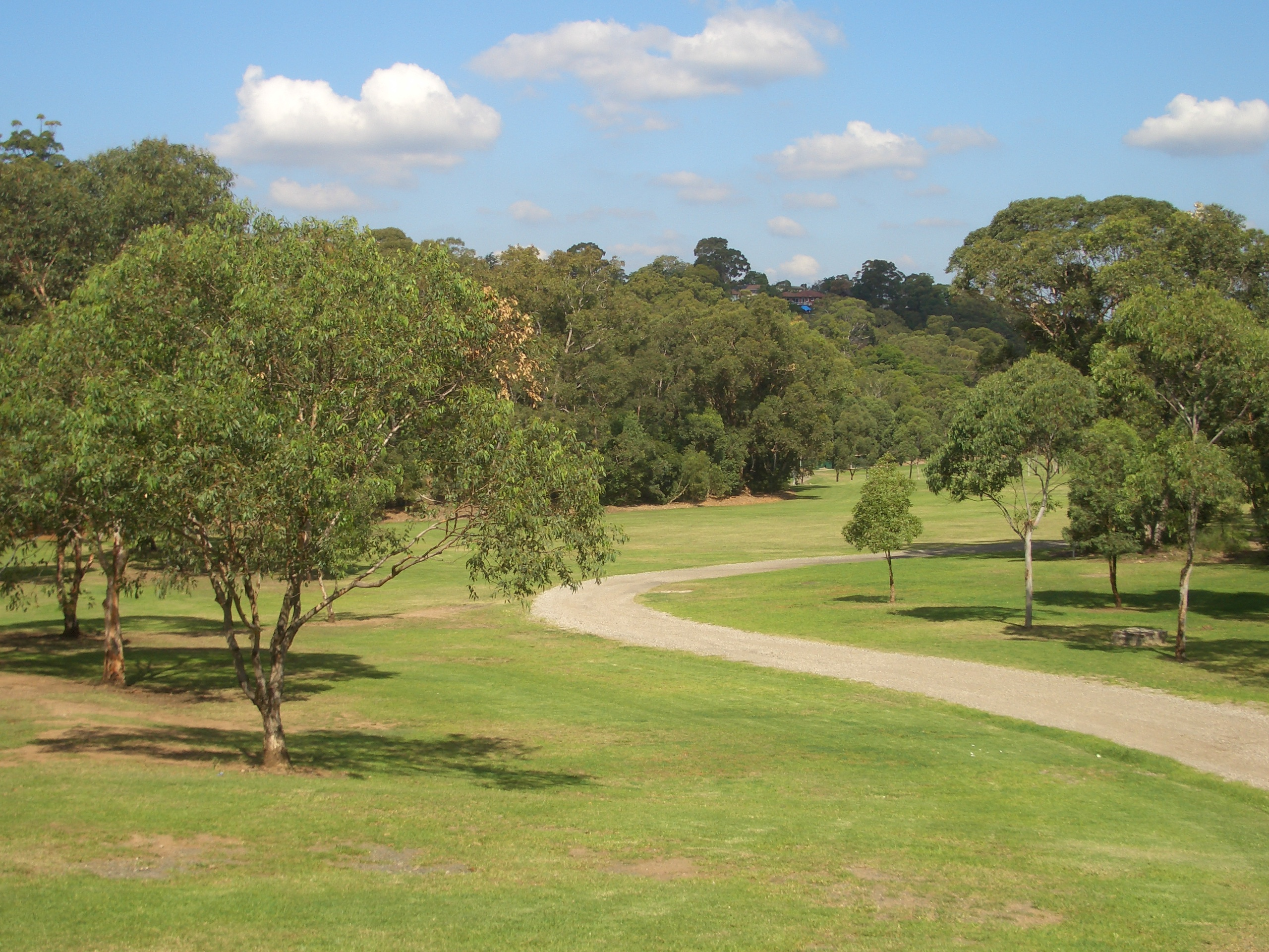 Gannons Park, Peakhurst Heights